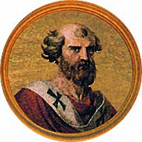 Pope Caelestinus II.jpg